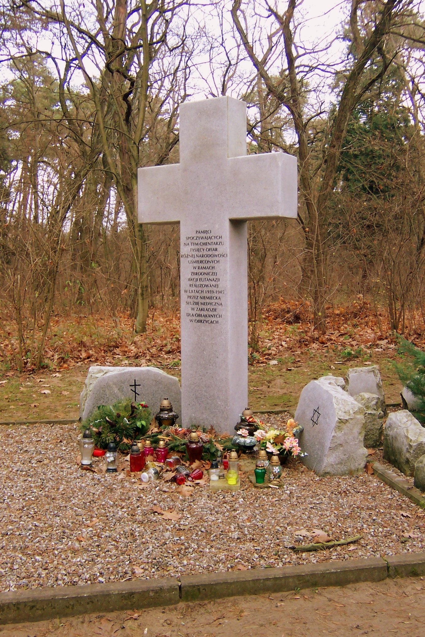 Pomnik poświęcony ofiarom zbrodni w latach 1942-1945